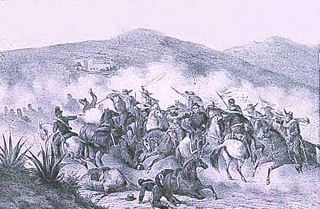 Escena de la Batalla de Totoapan